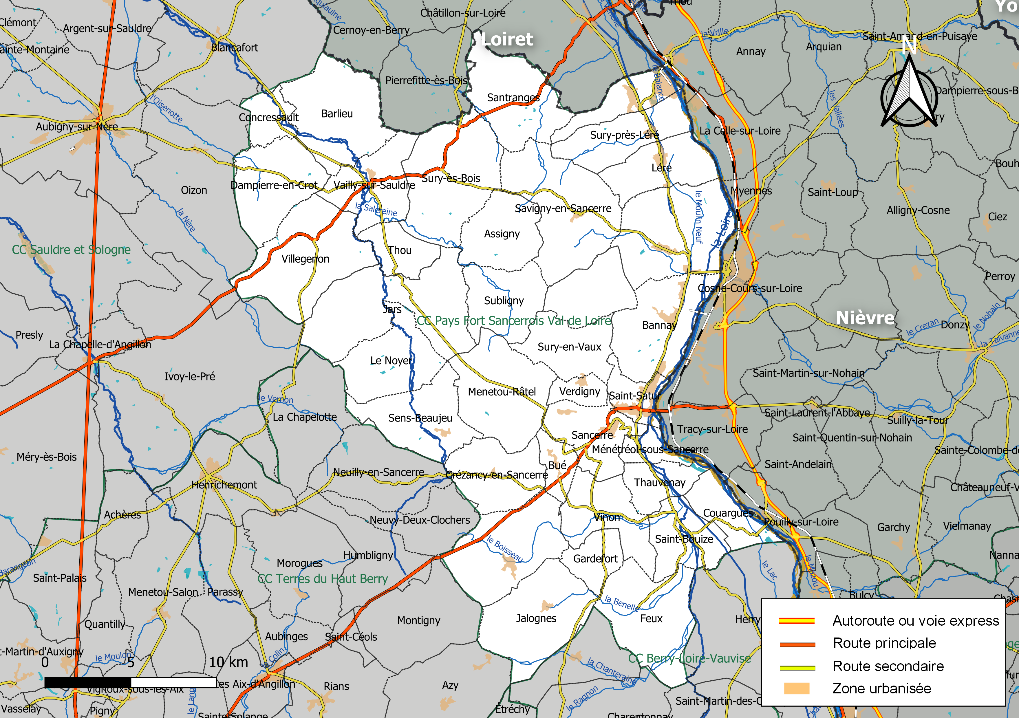 Carte géographique de la communauté de communes Pays Fort Sancerrois Val de Loire, département du Cher, France. Composition au 1er janvier 2019.